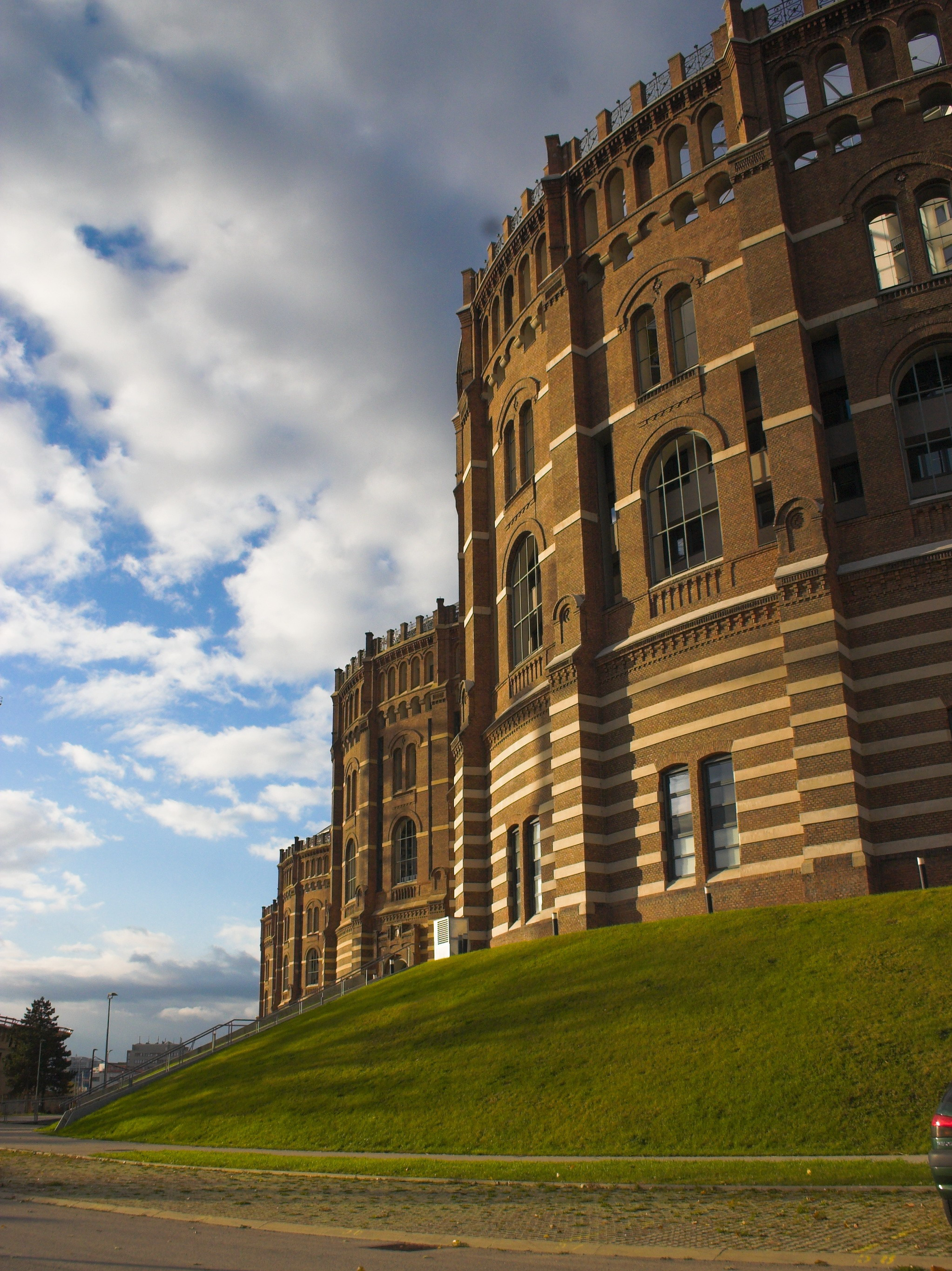 Gasometer in Wien / Vienna Gasometer